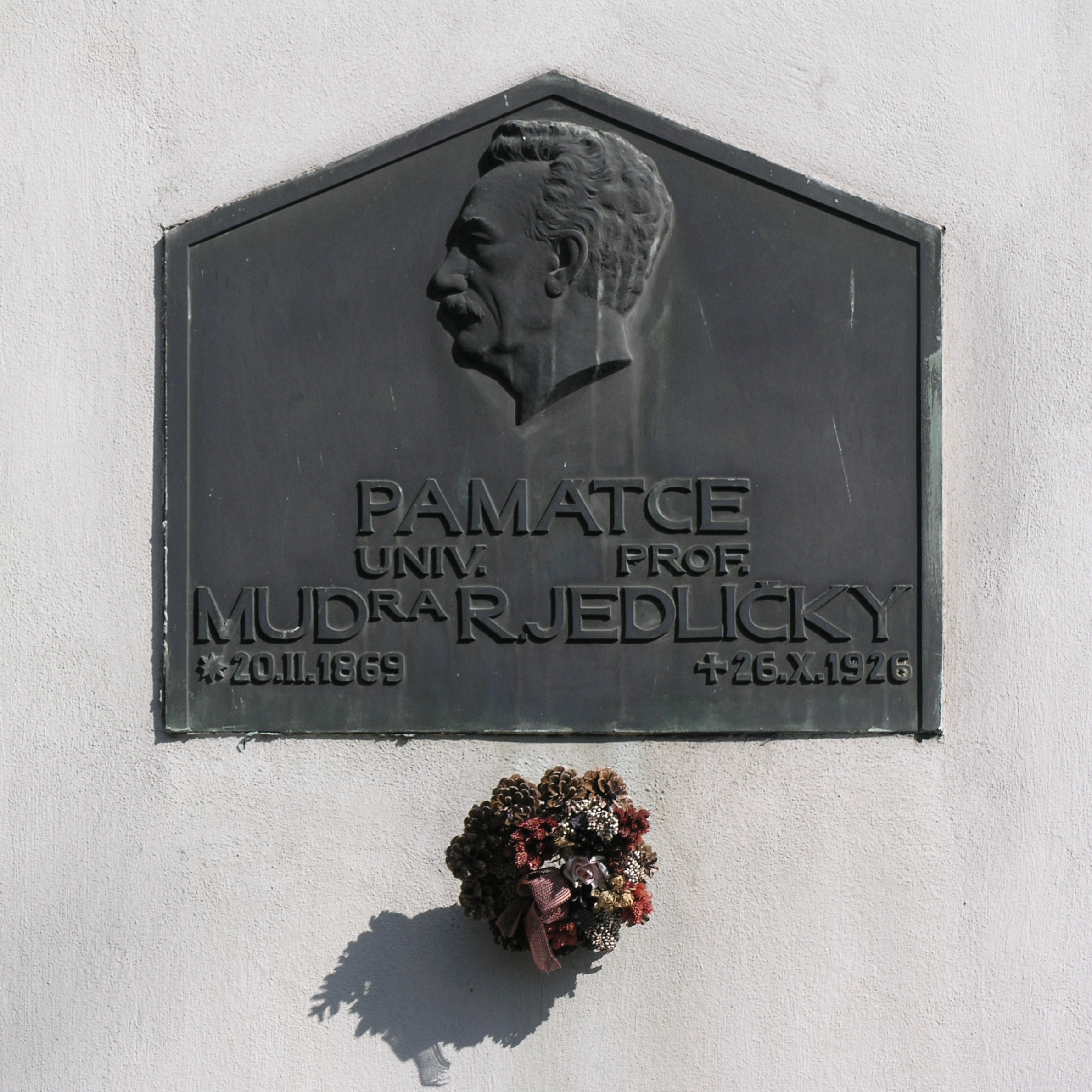 Lysá nad Labem - pamětní cedule Rudolfa Jedličky na jeho rodném domě (náměstí Bedřicha Hrozného 20/13)